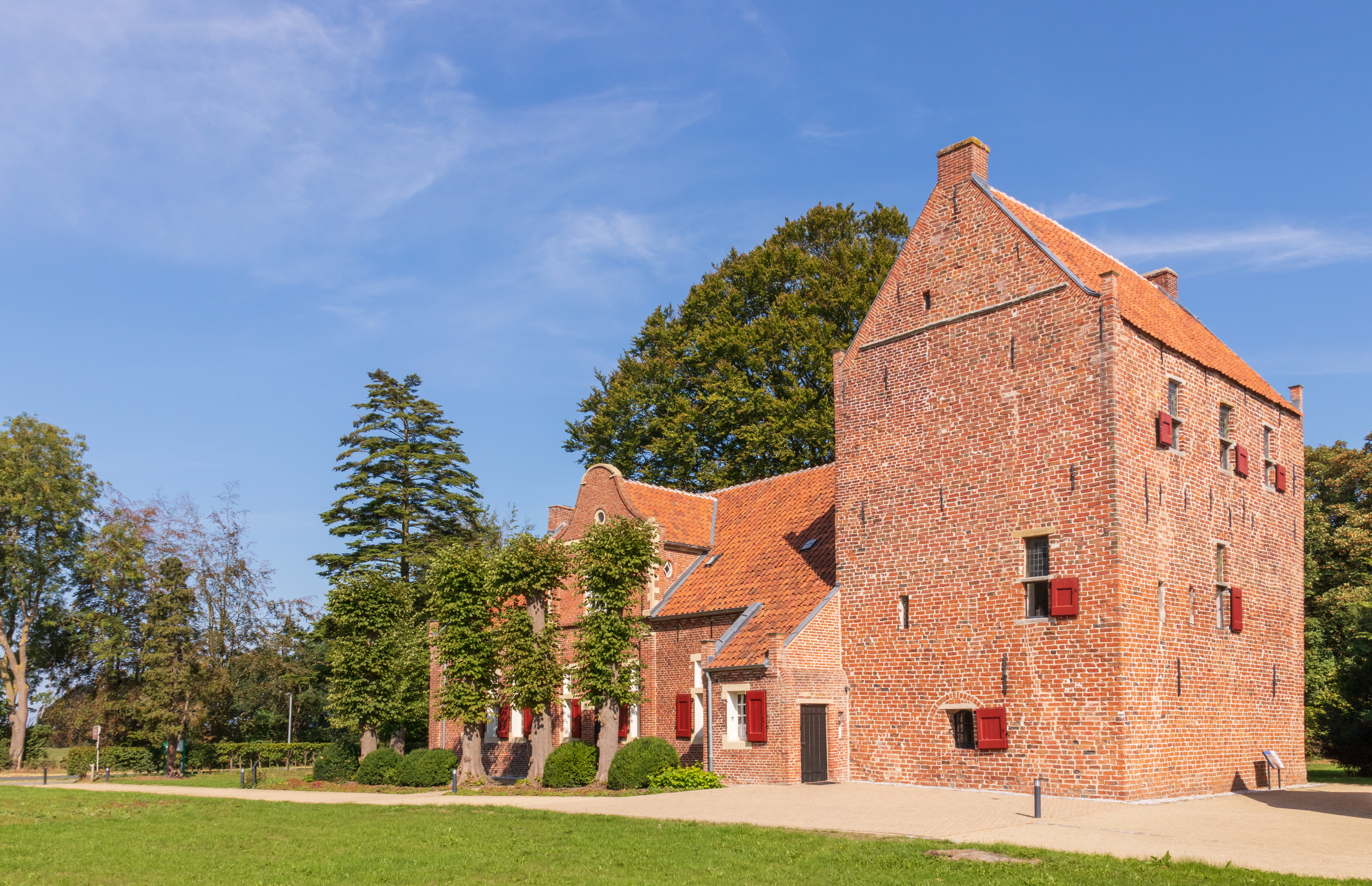 Steinhaus Bunderhee. Mehrgeschossiger turmartiger Backsteinbau aus dem 14. Jahrhundert. Rest einer häuptlingsburg. Im Westen anschließender eingeschossiger Barockbau unter Verwendung älterer Bausubstanz, "1712"; Bedeutung: historisch, wissenschaftlich; wesentliche Begründung: 1.05 geschichtliche Bedeutung aufgrund des Zeugnis- und Schauwertes für Bau- und Kunstgeschichte; Einzeldenkmal gemäß § 3.2 NDSchG; in Gruppe baulicher Anlagen: 457024Gr0008